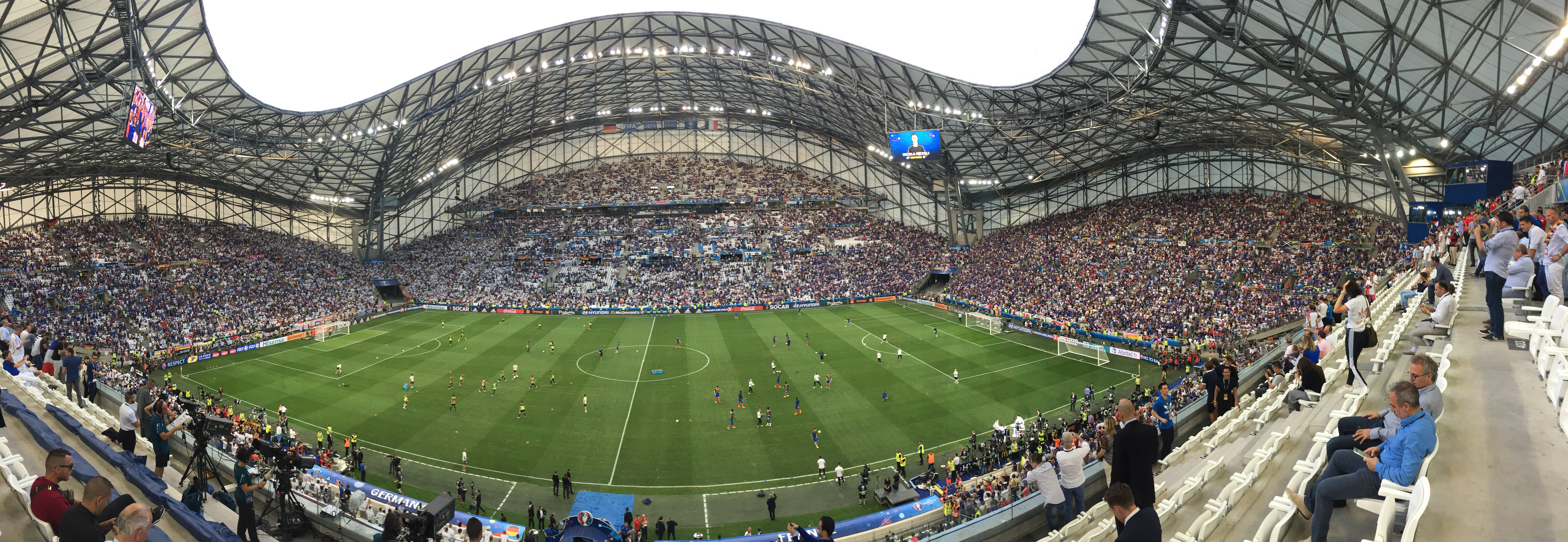 Stadion Marseille Stade Vélodrome